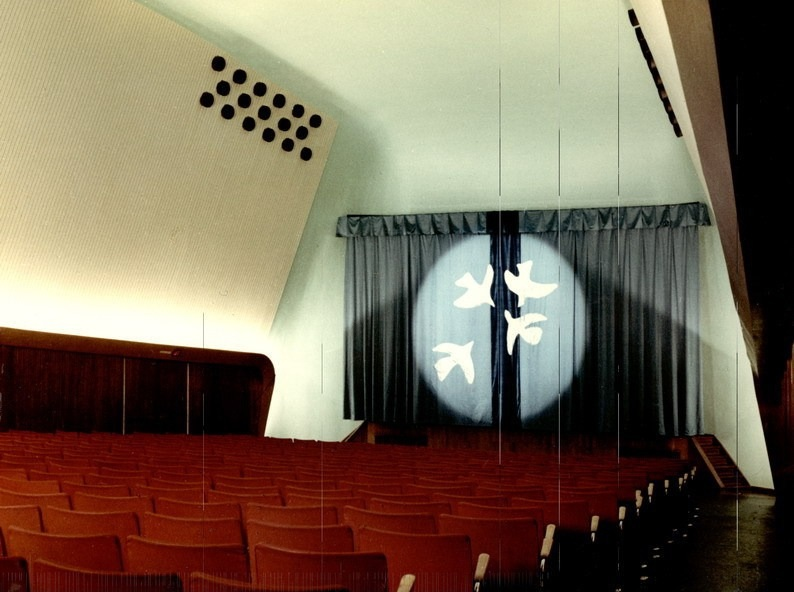 Jarlen kino etter ominnredning 1960. Kinosalen sett mot scenen, med sceneteppe og lysprojisering av fugler i siluett.